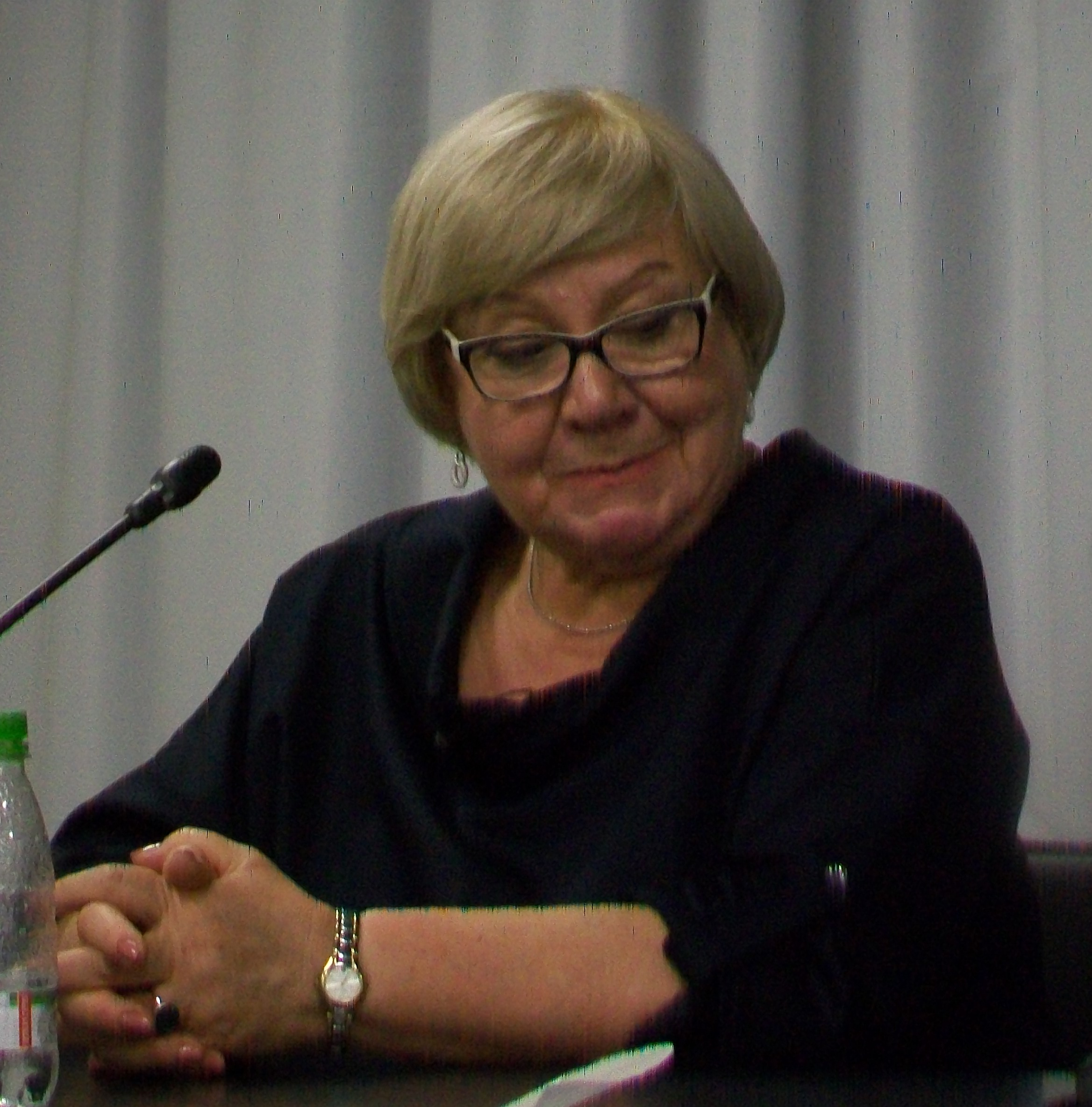 Анна Халдей, дочь Евгения Халдея. Ельцин-центр, 23 октября 2017 года